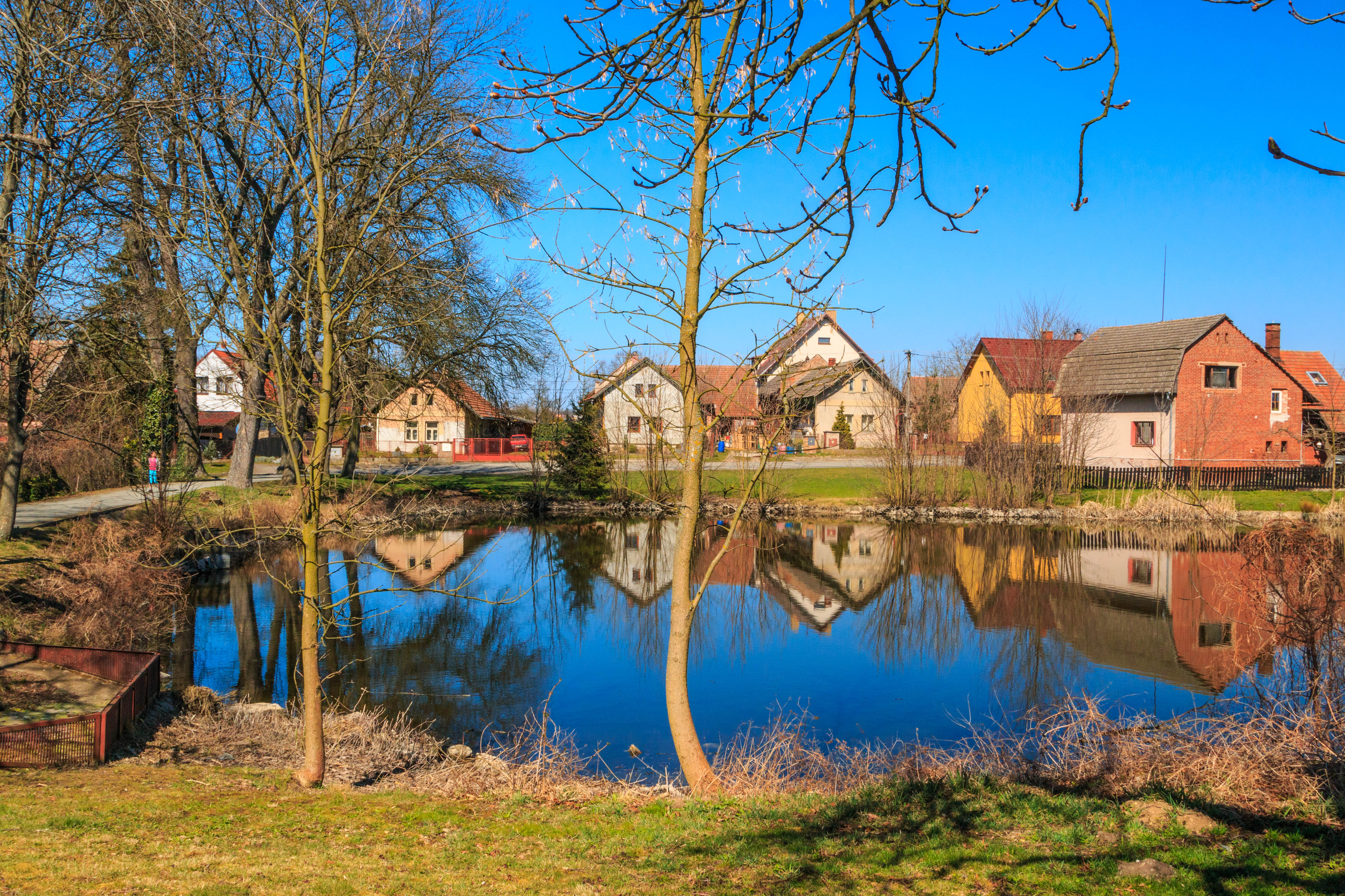 Kunčické rybníky - soustava tří rybníků v obcu kunčice v okrese Hradec Králové - rybník III Project: Vodstvo.